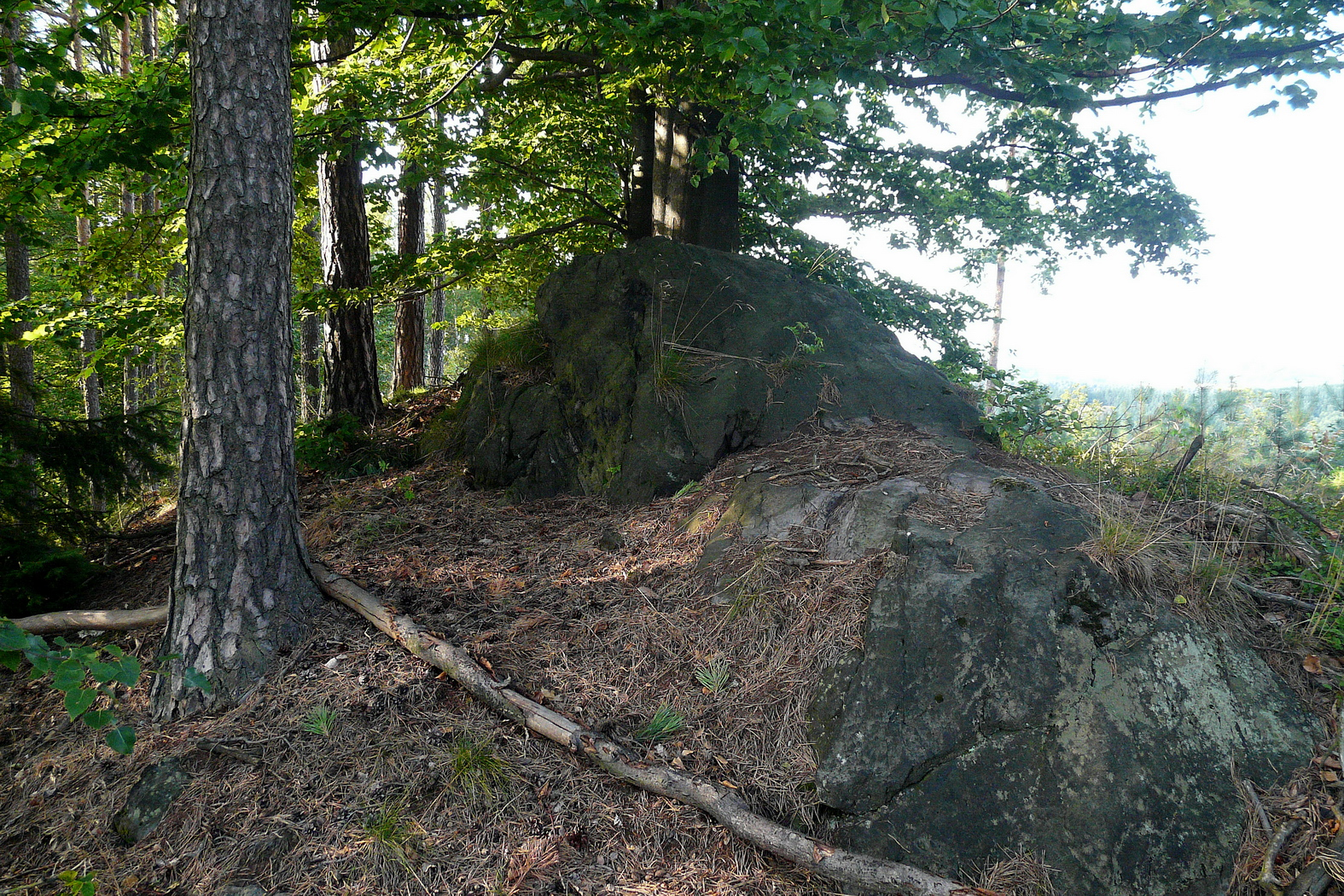 Pískovcový vrchol Bořejovského vrchu